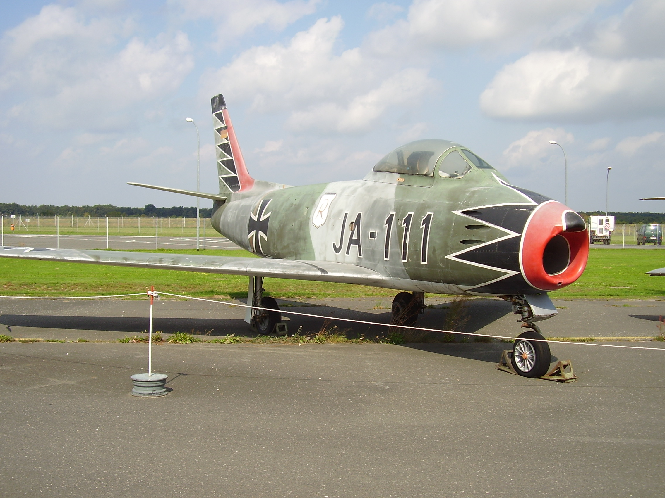 Luftwaffenmuseum der Bundeswehr; Airforce Museum of the Bundeswehr; Berlin-Gatow